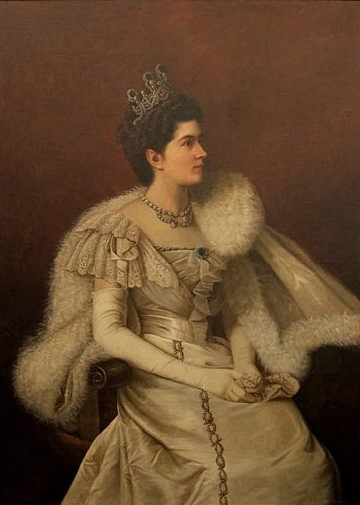 Ritratto della principessa Elena di Savoia, olio su tela, Palazzo del Quirinale, Roma